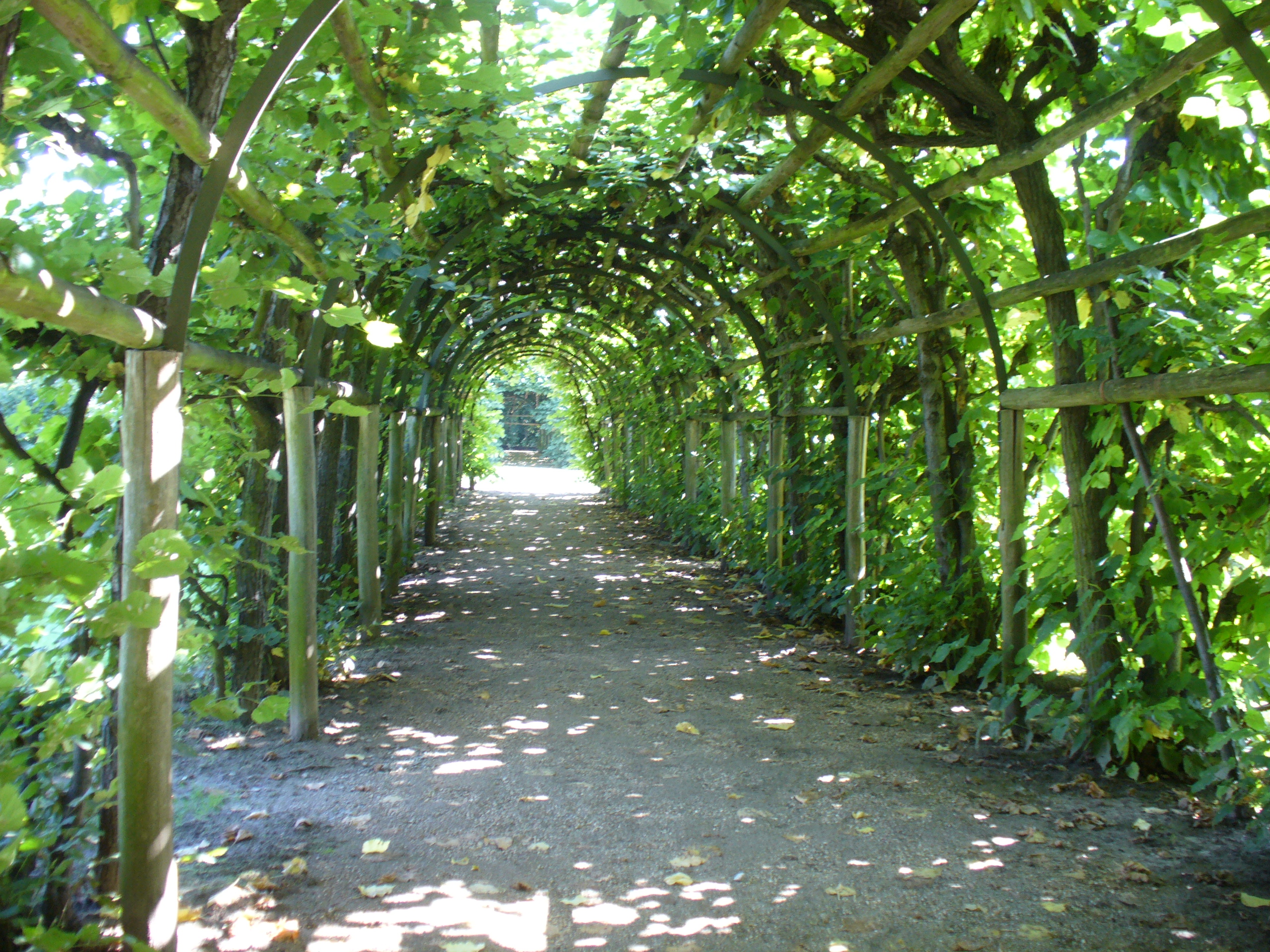 Holländischer Garten-Mit Weinreben überwachsene Gänge